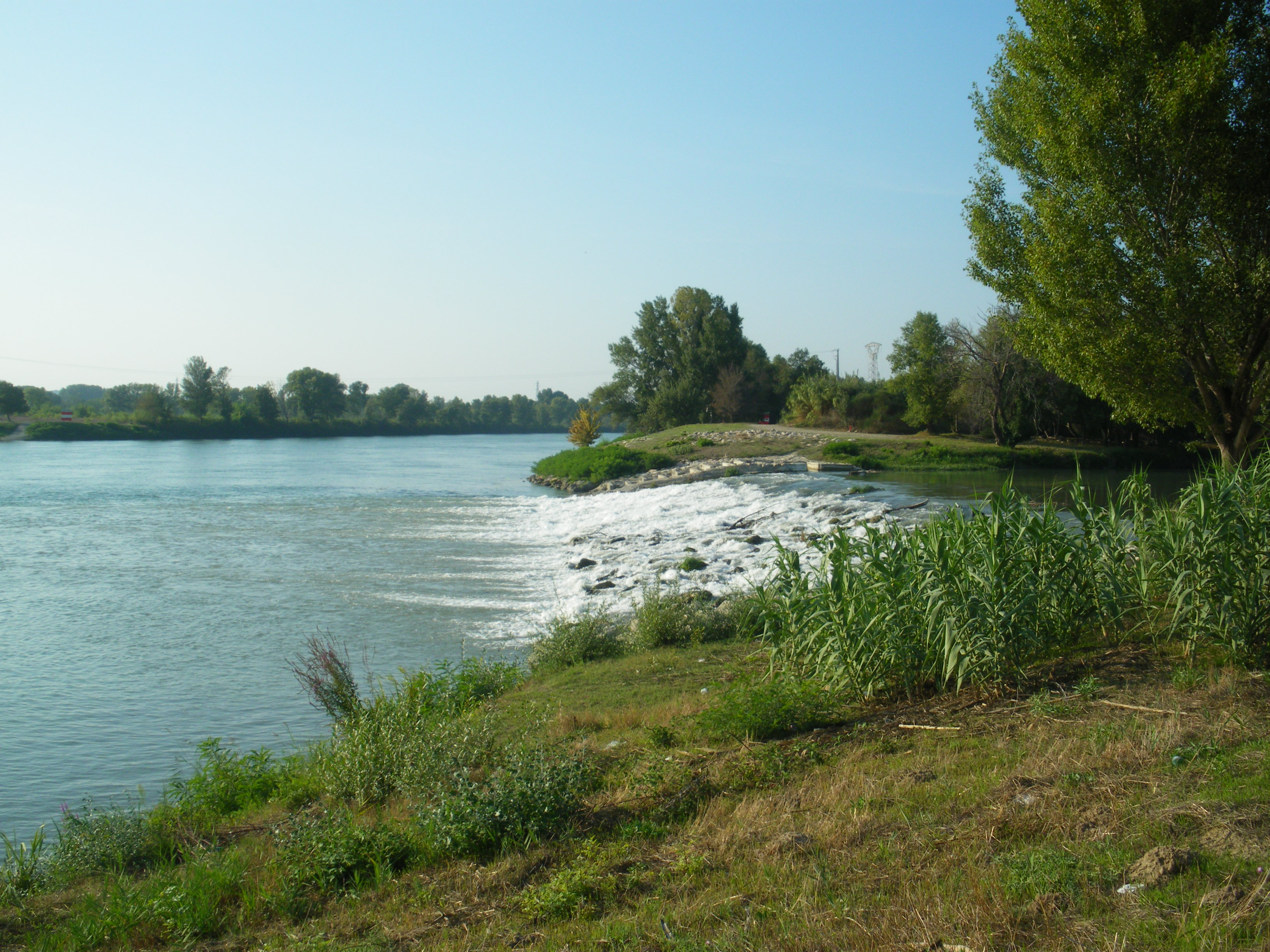 Embouchure de l'Ouvère, au Rhône, Vaucluse, France